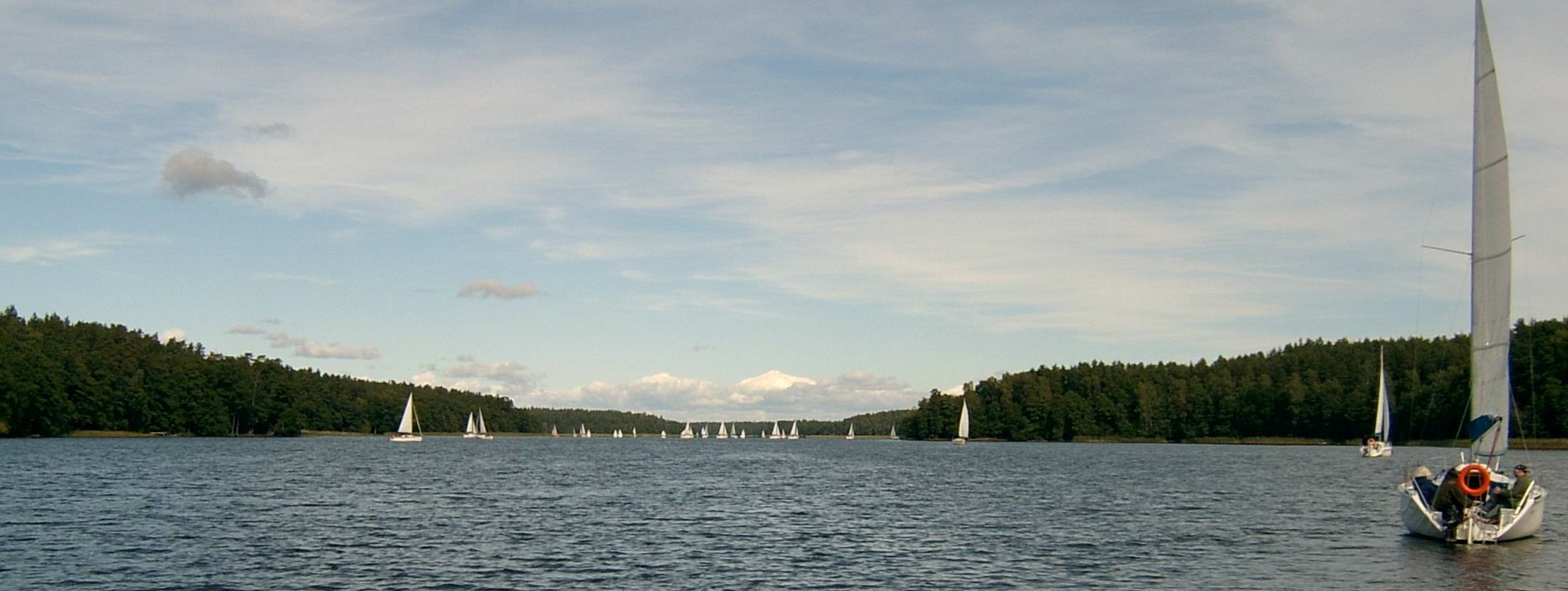 See in den Masuren bei Mikołajki photographer: Sicherlich Post date: september 2005